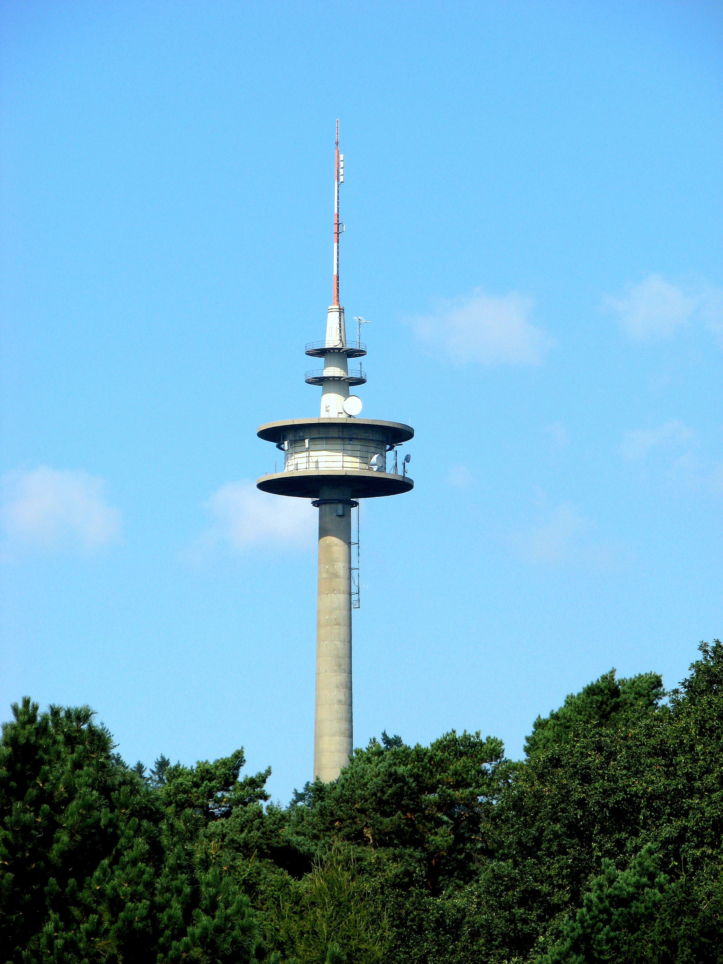 Mulleklenkes, Fermeldeturm auf der Karlshöhe im Aachener Wald.